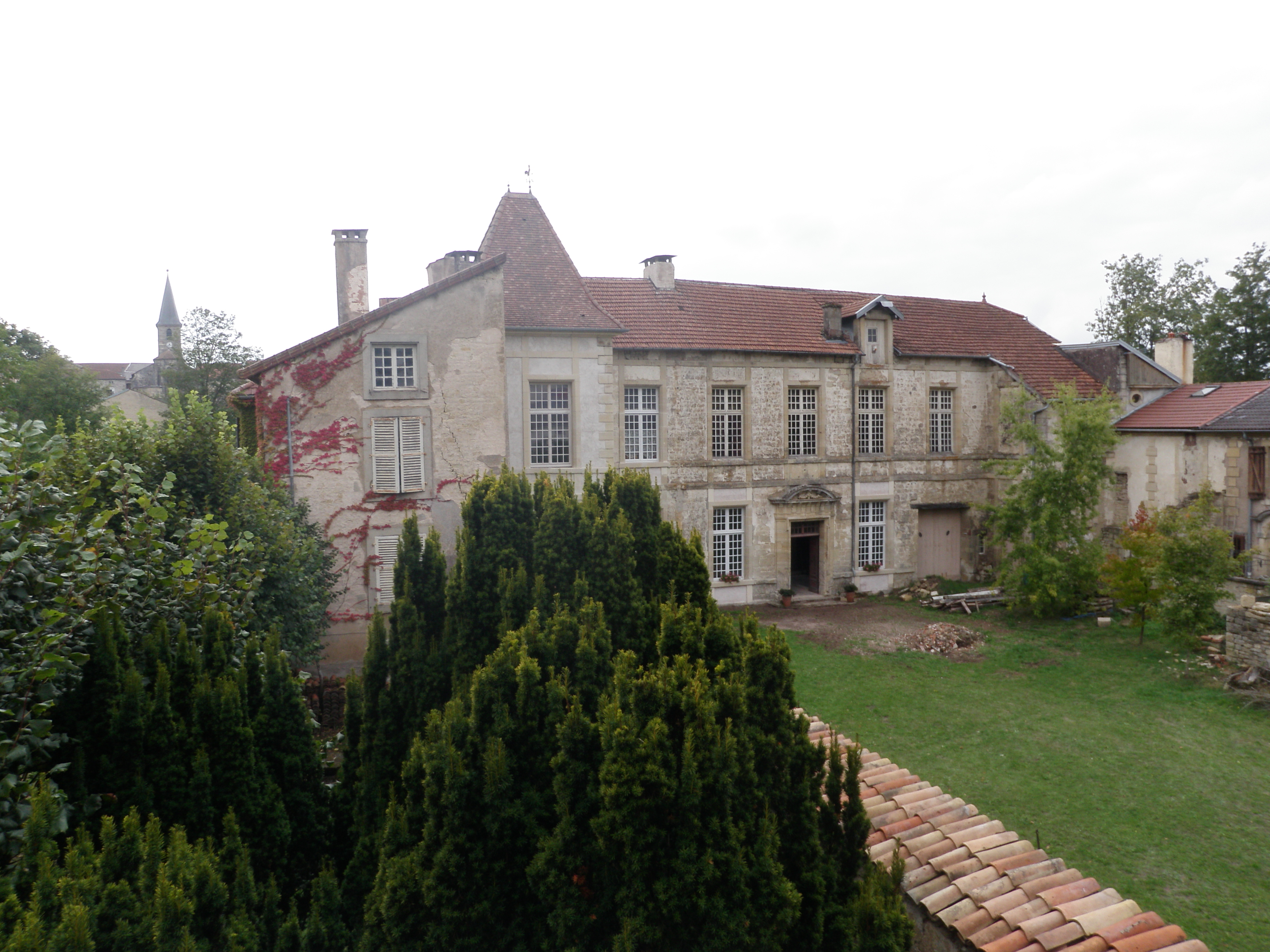 Façade est